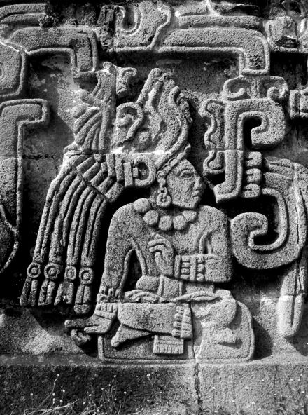 Xochicalco scultpture